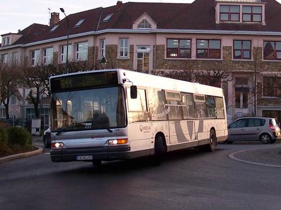 Depot TRA coubron - GX 317